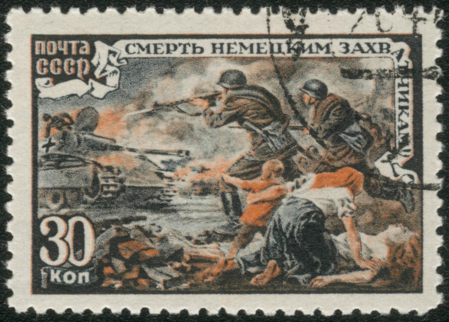 Смерть немецким захватчикам! Почтовая марка СССР, 1945. Автоматчики и подбитая "пантера" T V. Худ.: Г. Савицкий. ЦФА #968